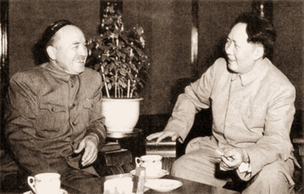 1950年6月28日，包尔汉和毛泽东在中南海亲切交谈。